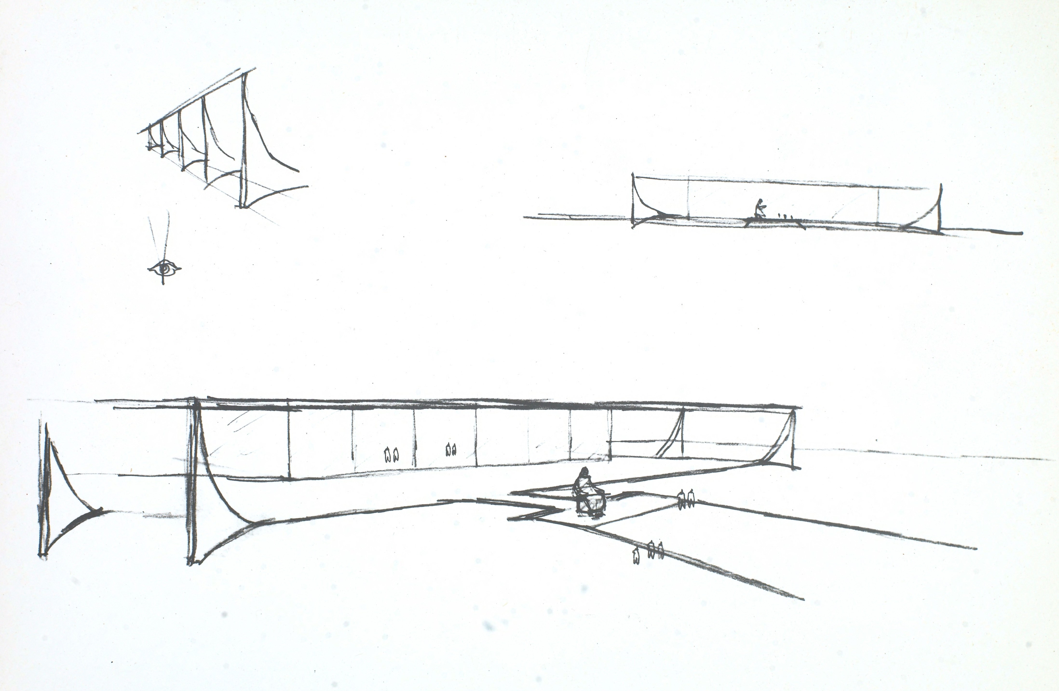 Fotografia do Fundo Correio da Manhã, sob a guarda do Arquivo Nacional.